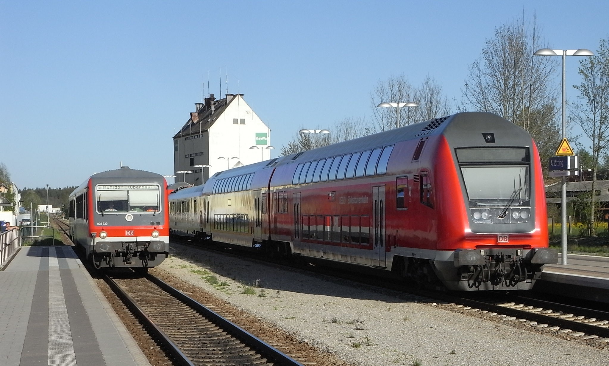 Zugbegegnung im Bahnhof Altötting.